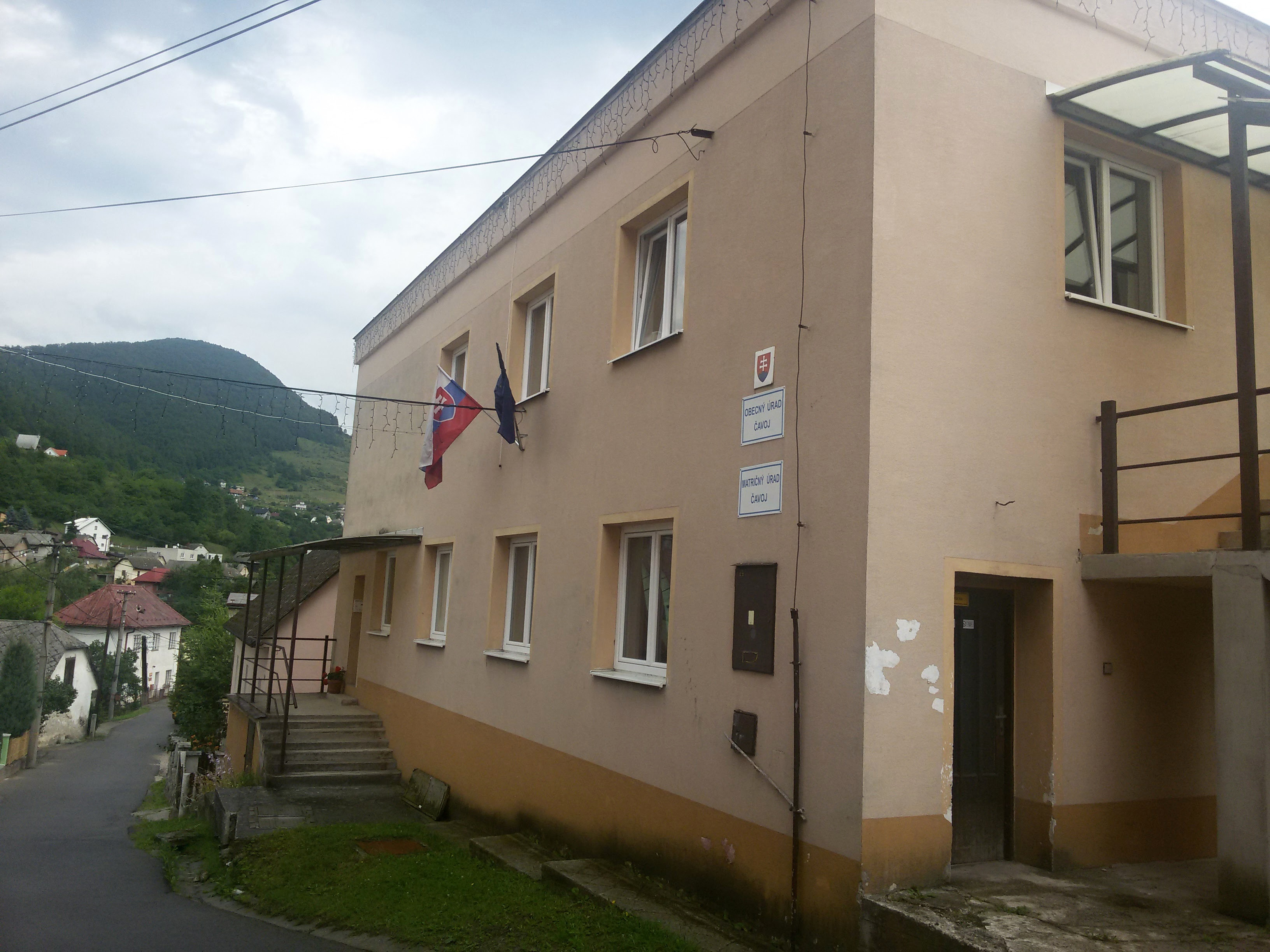 Čavoj